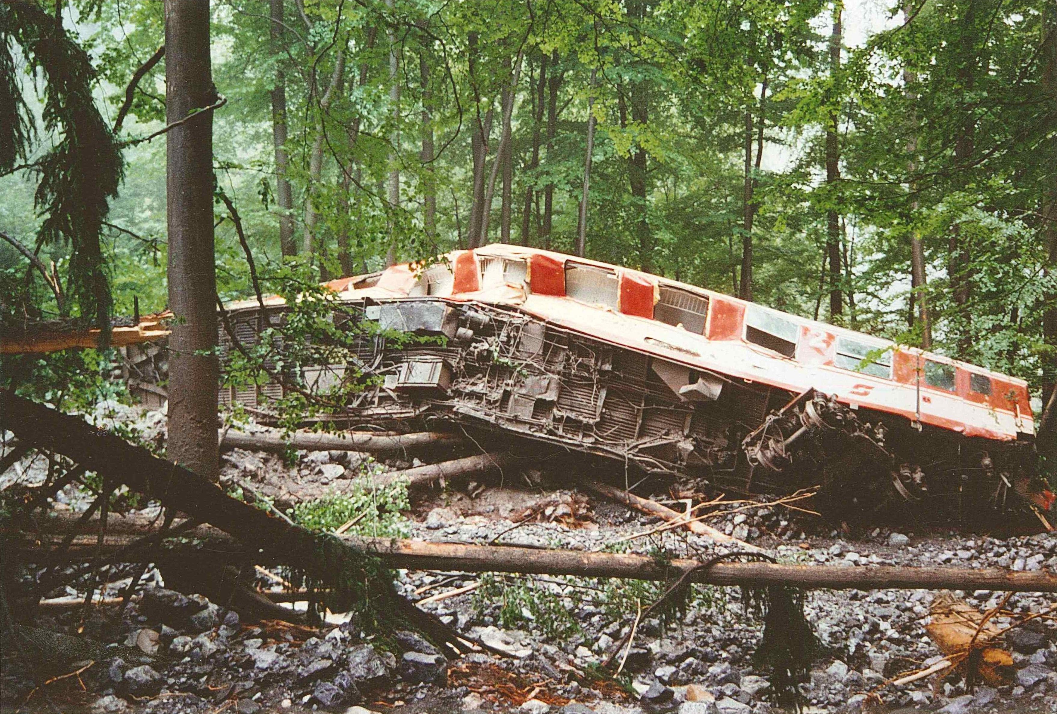 Absturzstelle im Masonbach beim Zugunglück von Braz 1995 Original-Filename: Masonbach_1995_Doku_VP_Bild_10_Blick_auf_den_ersten_Waggon_nach_Lokomotive.jpg